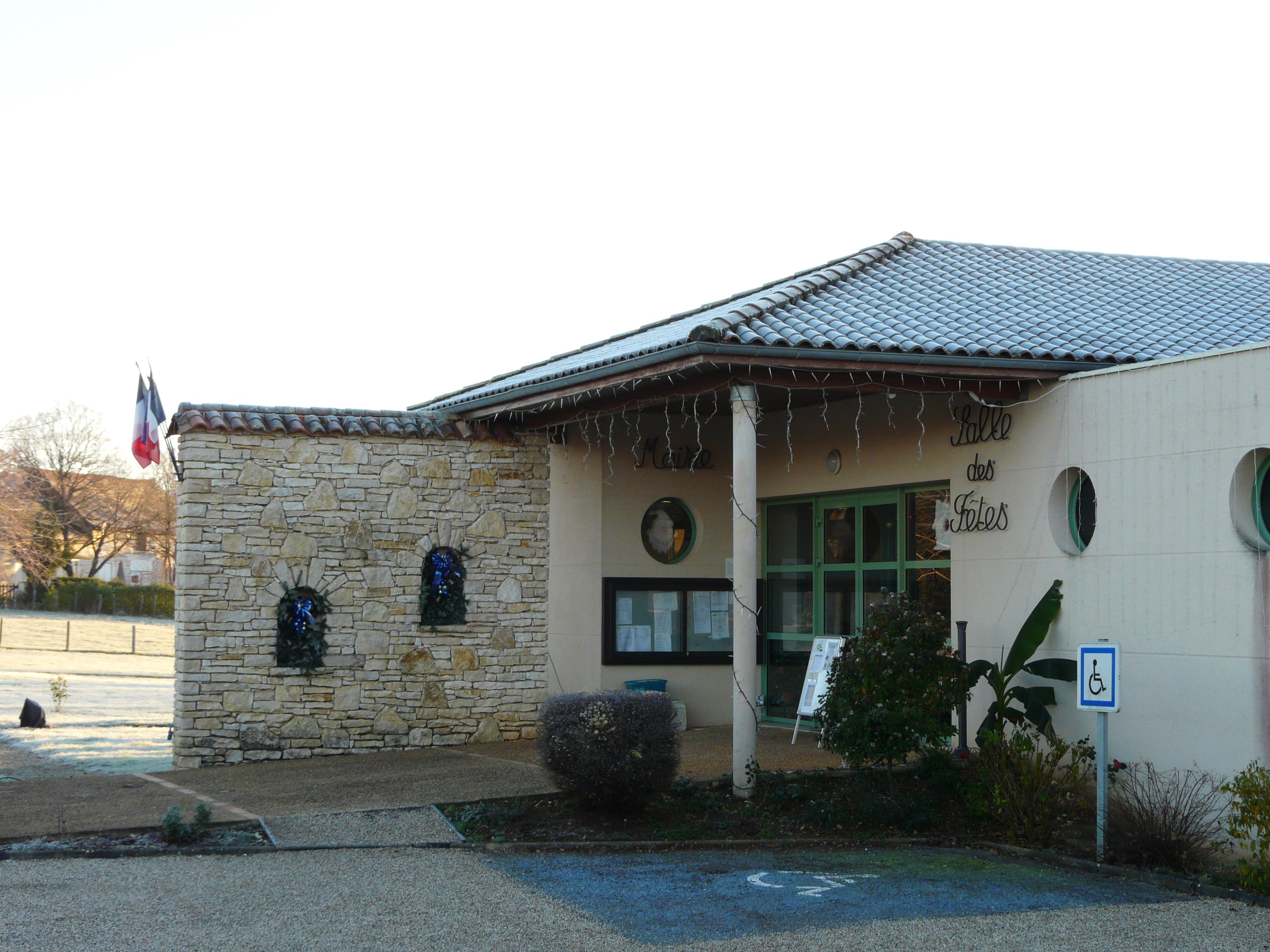 La mairie de Saint-Jory-las-Bloux, Dordogne, France.